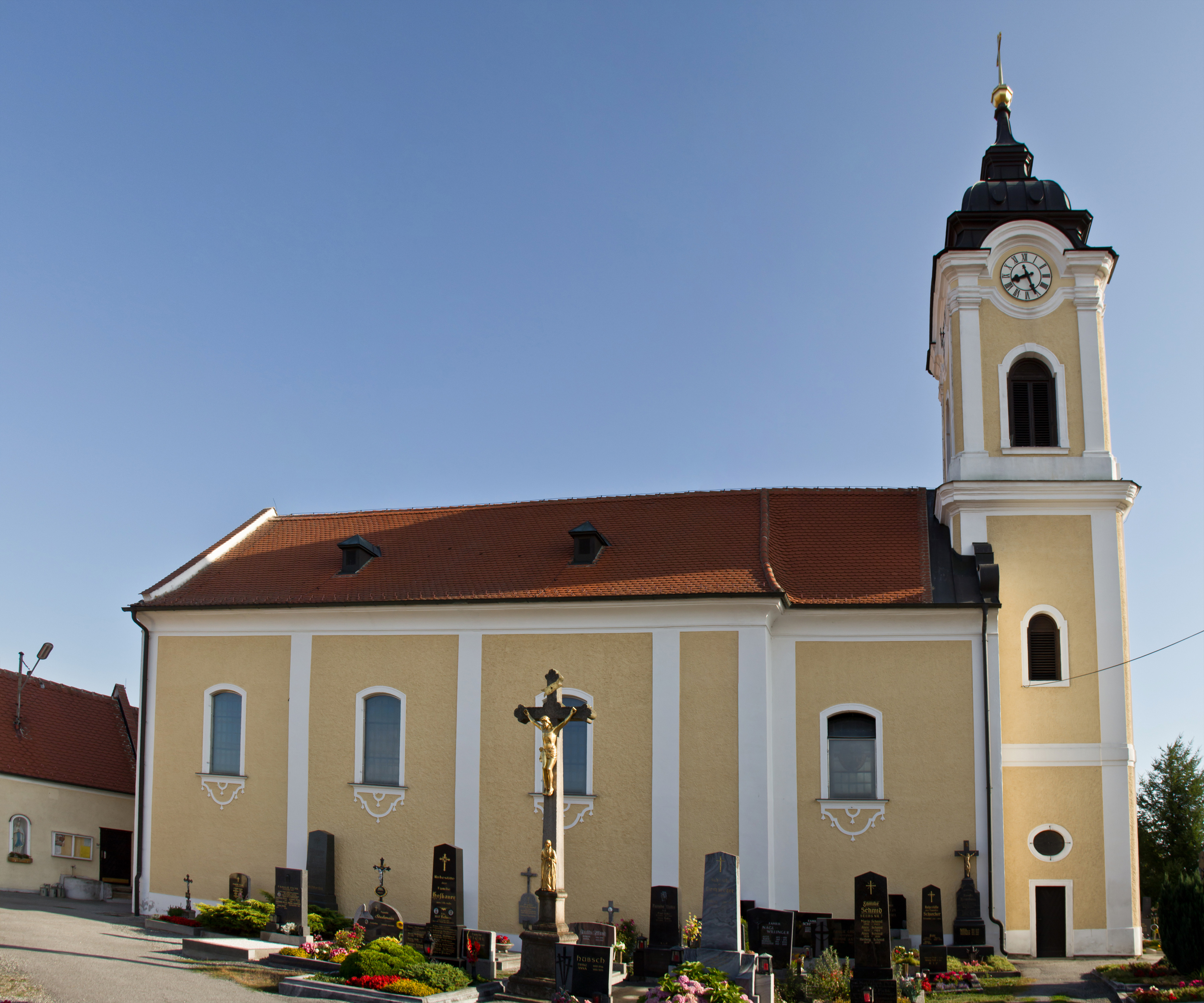 Die spätbarocke Saalkirche mit Ostturm befindet sich als nördlicher Abschluss des Straßenplatzes erhöht auf einer Geländestufe im Osten des Ortes.